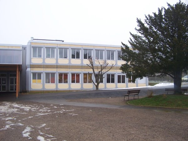 Collège_Camille_Flammarion(Val_de_Meuse).JPG